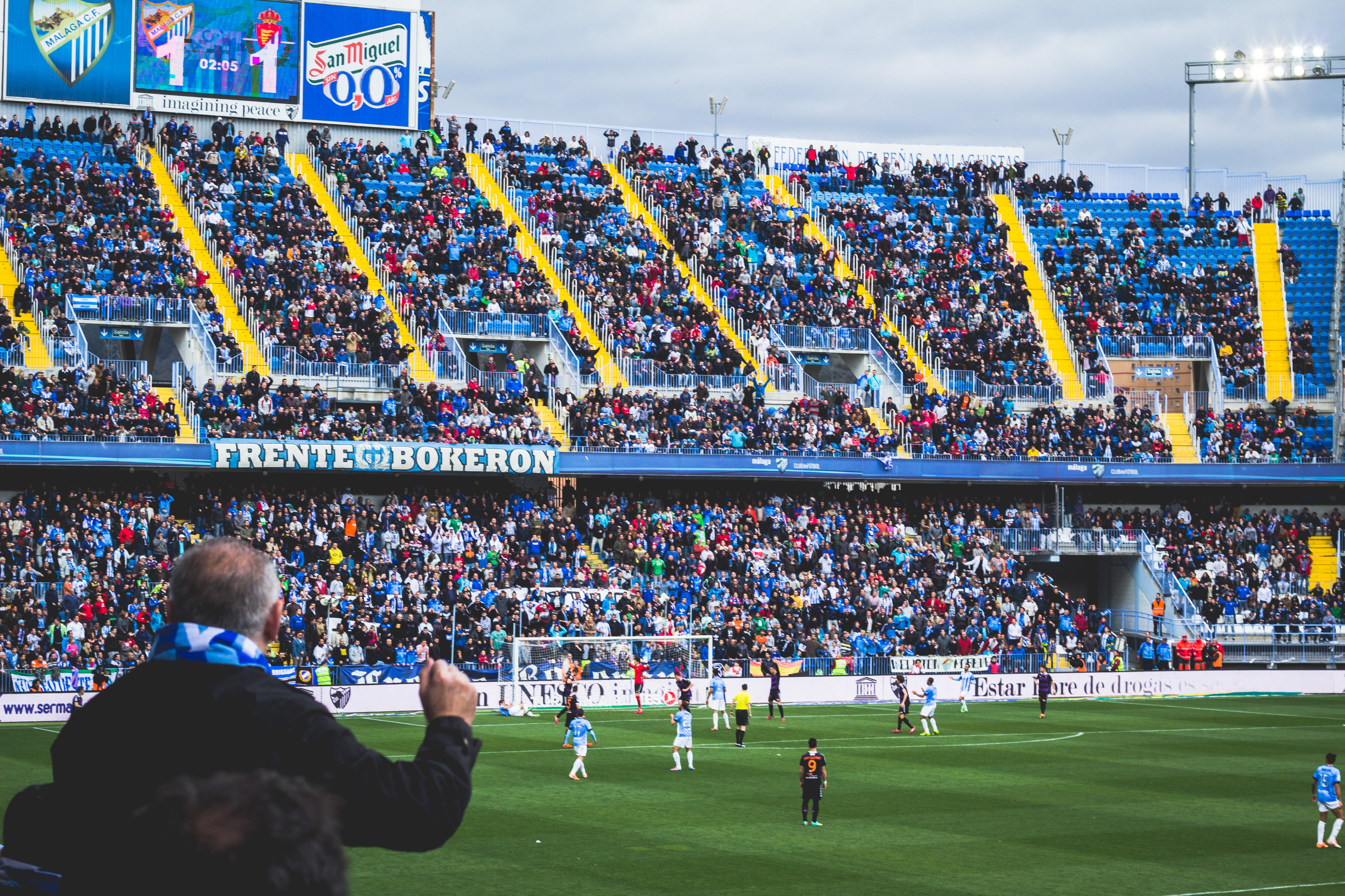 Estadio La Rosaleda, Málaga, España.